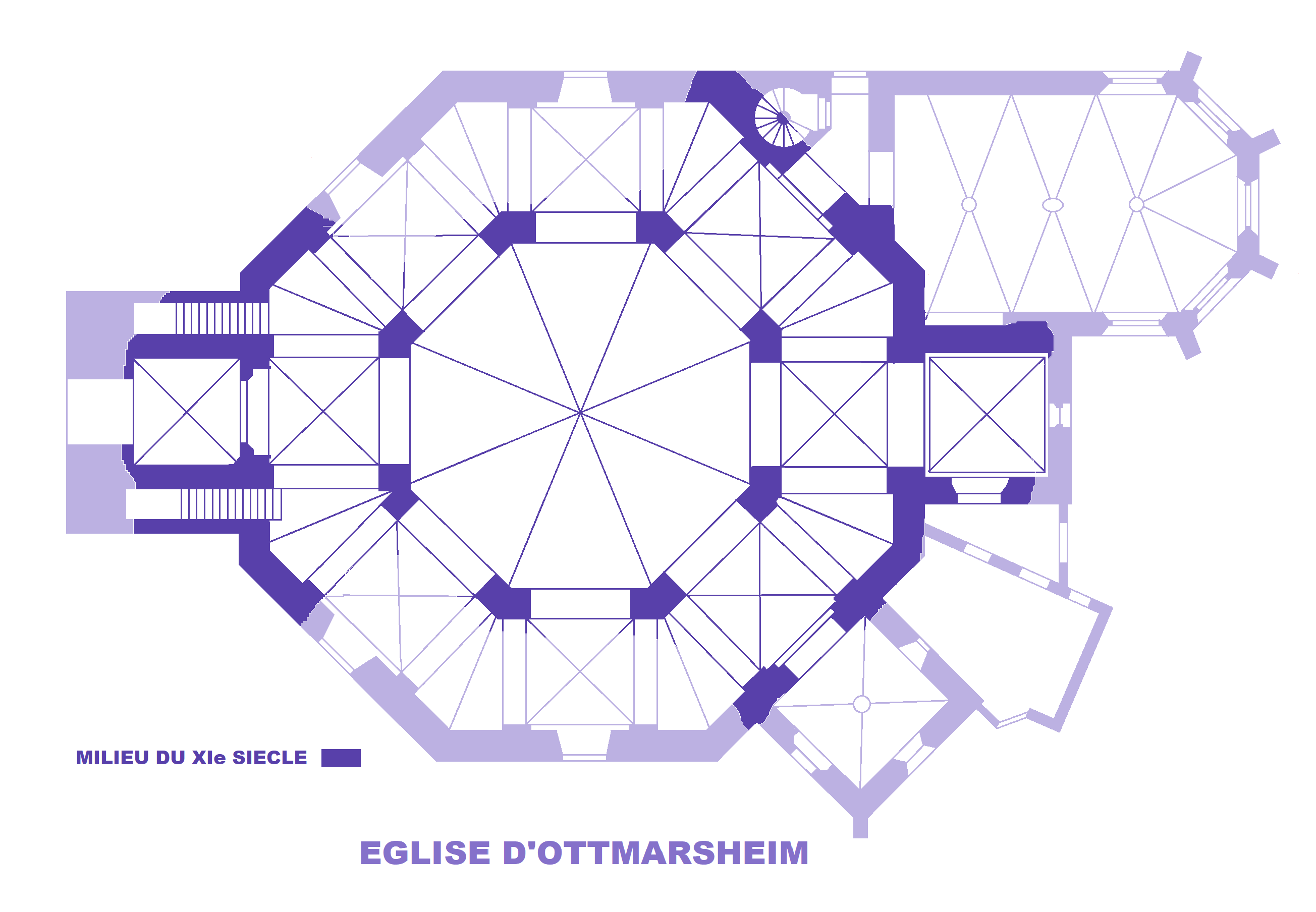 Eglise d'Ottmarsheim, plan